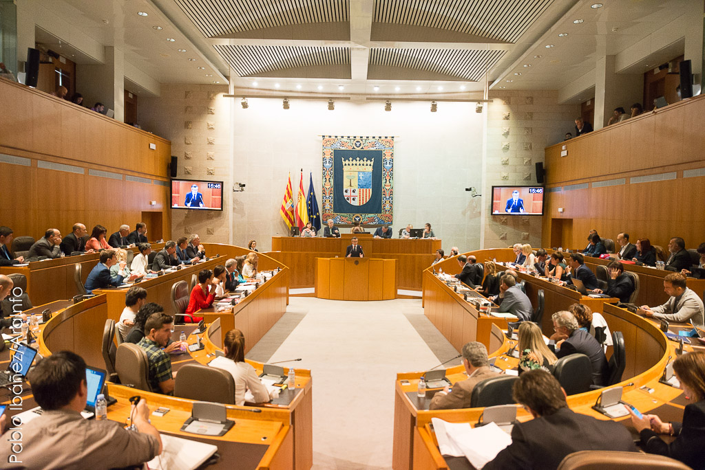 Debate de Aragón_segundo día_marca de agua_foto-Pablo Ibáñez-15